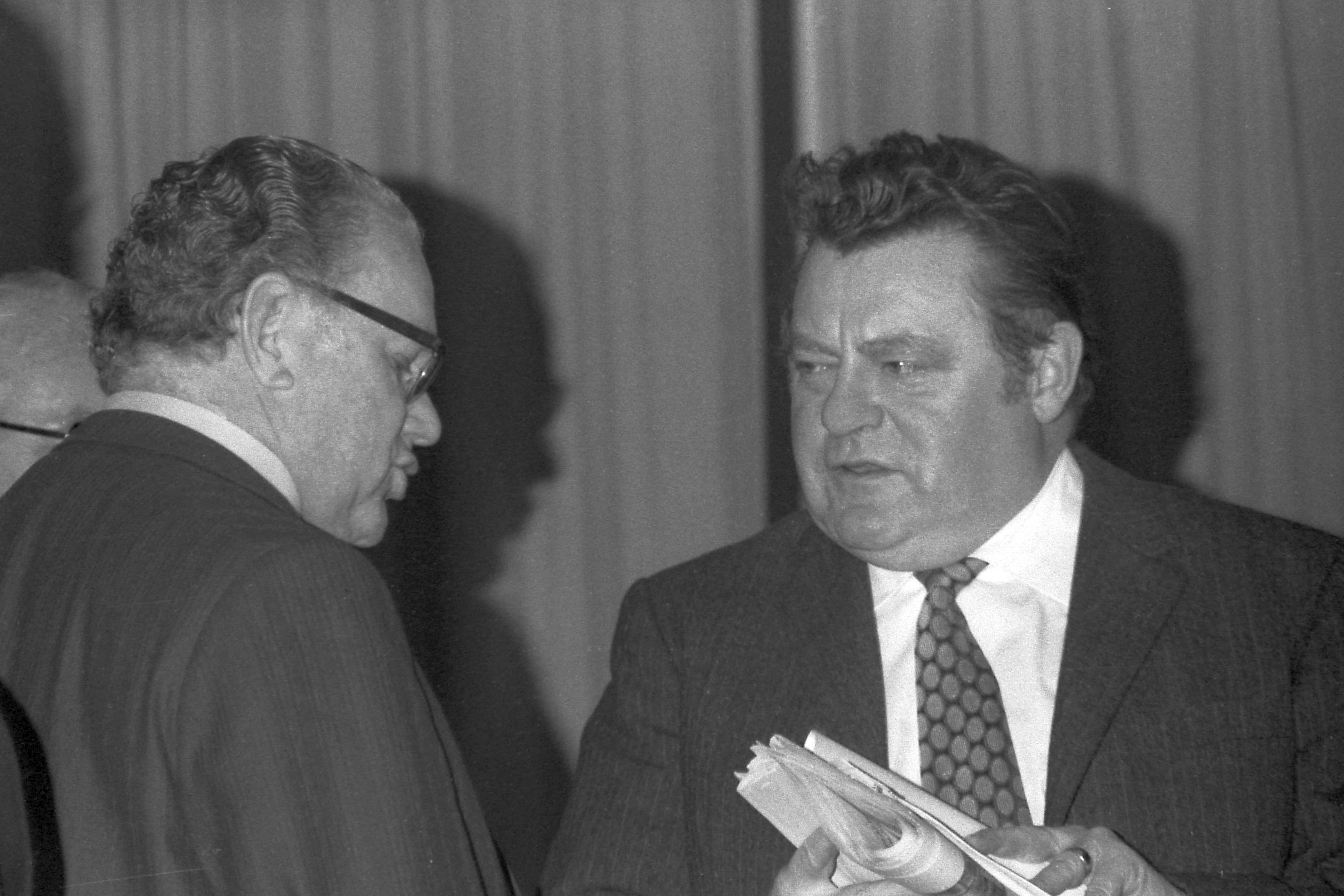 Richard Stücklen (Vorsitzender des CSU-Landesgruppe im Bundestag) und Franz Josef Strauß (CSU-Vorsitzender sowie wirtschafts- und finanzpolitischer Sprecher der CDU/CSU-Fraktion im Bundestag) am Rande einer CSU-Kundgebung in Roth im März 1972 (vor den bayerischen Kommunalwahlen im Juni 1972)